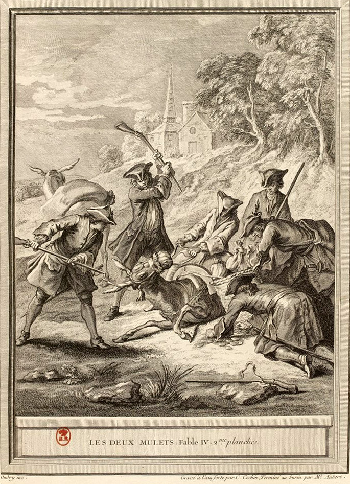 Gravure réalisée par Michel Aubert et Charles-Nicolas Cochin (II) d'après un dessin de Jean-Baptiste Oudry représentant la fable Les deux mulets de Jean de La Fontaine (fable 4 du livre I). Cette gravure est parue dans l'édition complète des fables de La Fontaine, parue en quatre tomes chez l'éditeur Desaint & Saillant, rue saint Jean de Beauvais à Paris, 1755-1759.